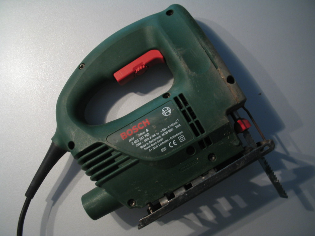 Decoupeerzaag